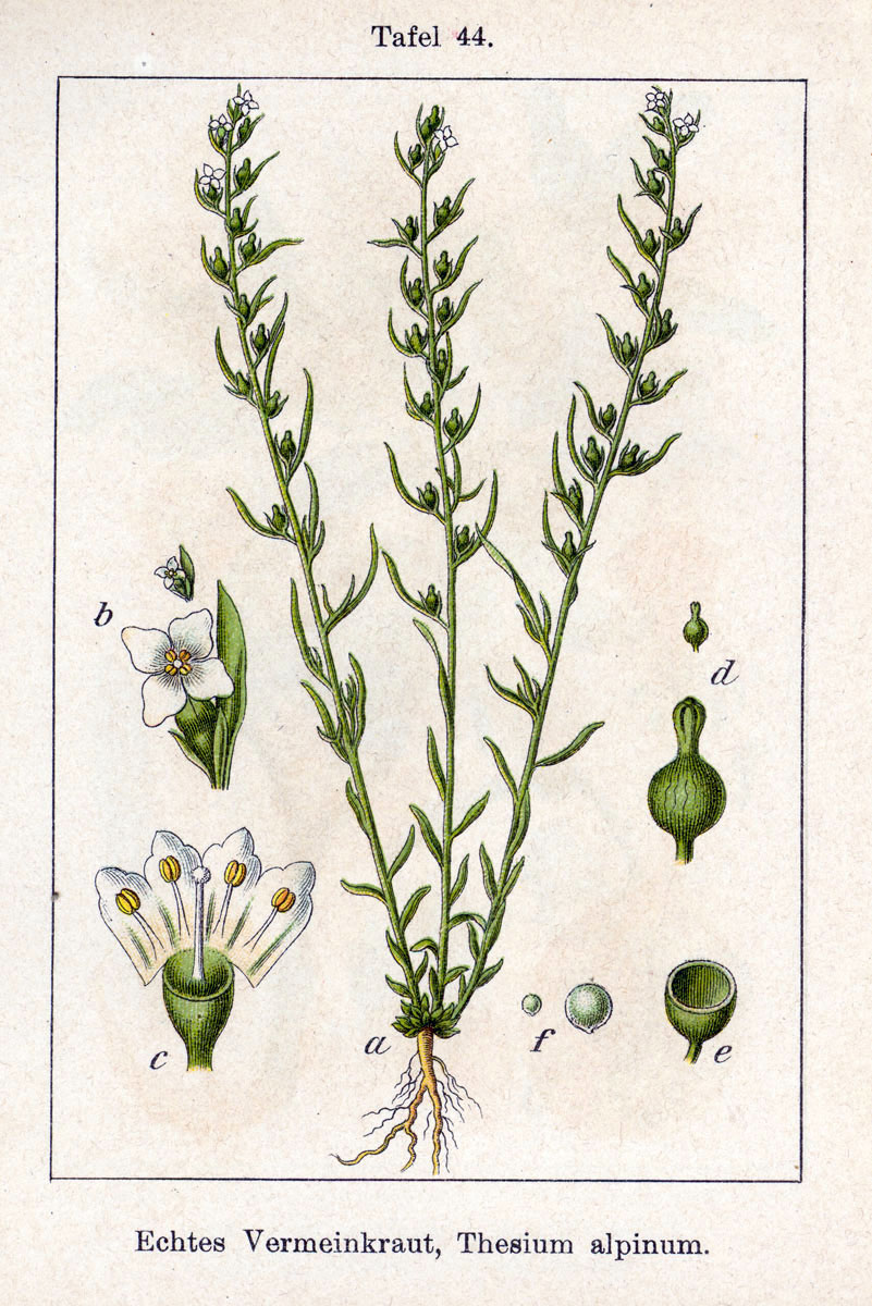 Thesium alpinum L. Original Description Echtes Vermeinkraut, Thesium alpinum